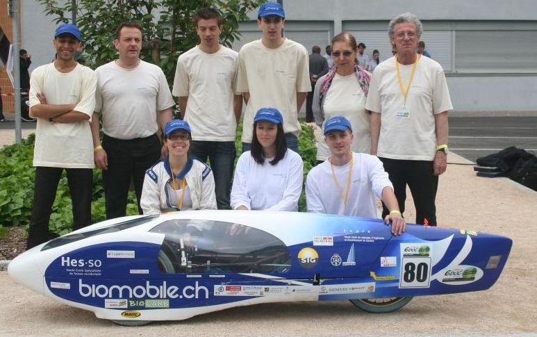 Une photo prise juste après le passage du contrôle technique.